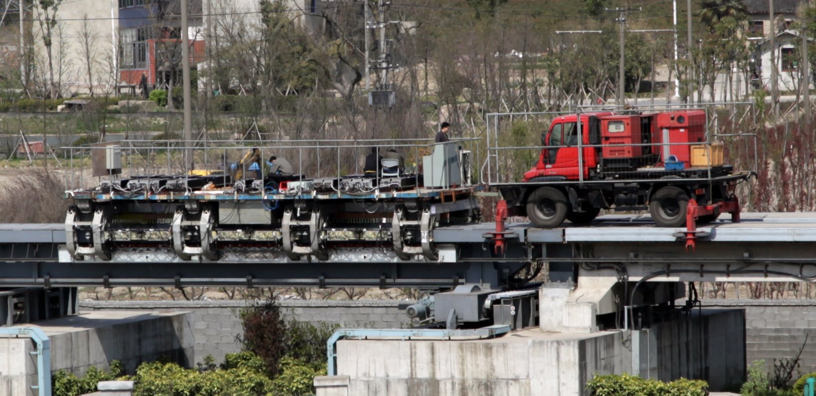 CM1 Dolphin (halbes) Fahrwerk auf der Teststrecke im Jiading Campus der Tongji-Universität. Das Fahrzeug bewegt sich auf der eigentlichen Teststrecke in Richtung des östlichen Arms der Weiche.